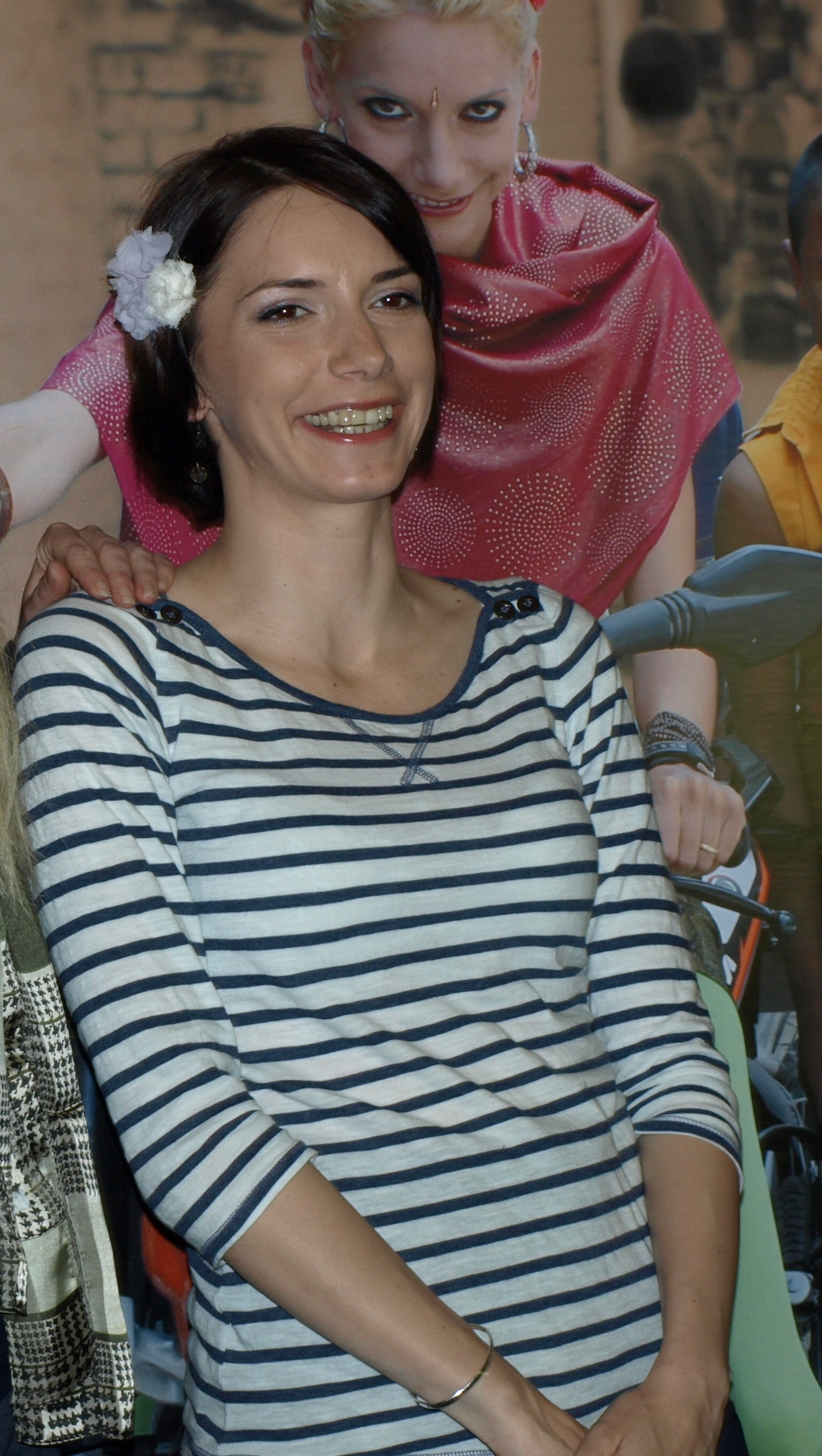 Dorota Láberová-Nvotová z premiéry filmu Fulmaya, děvčátko s tenkýma nohama